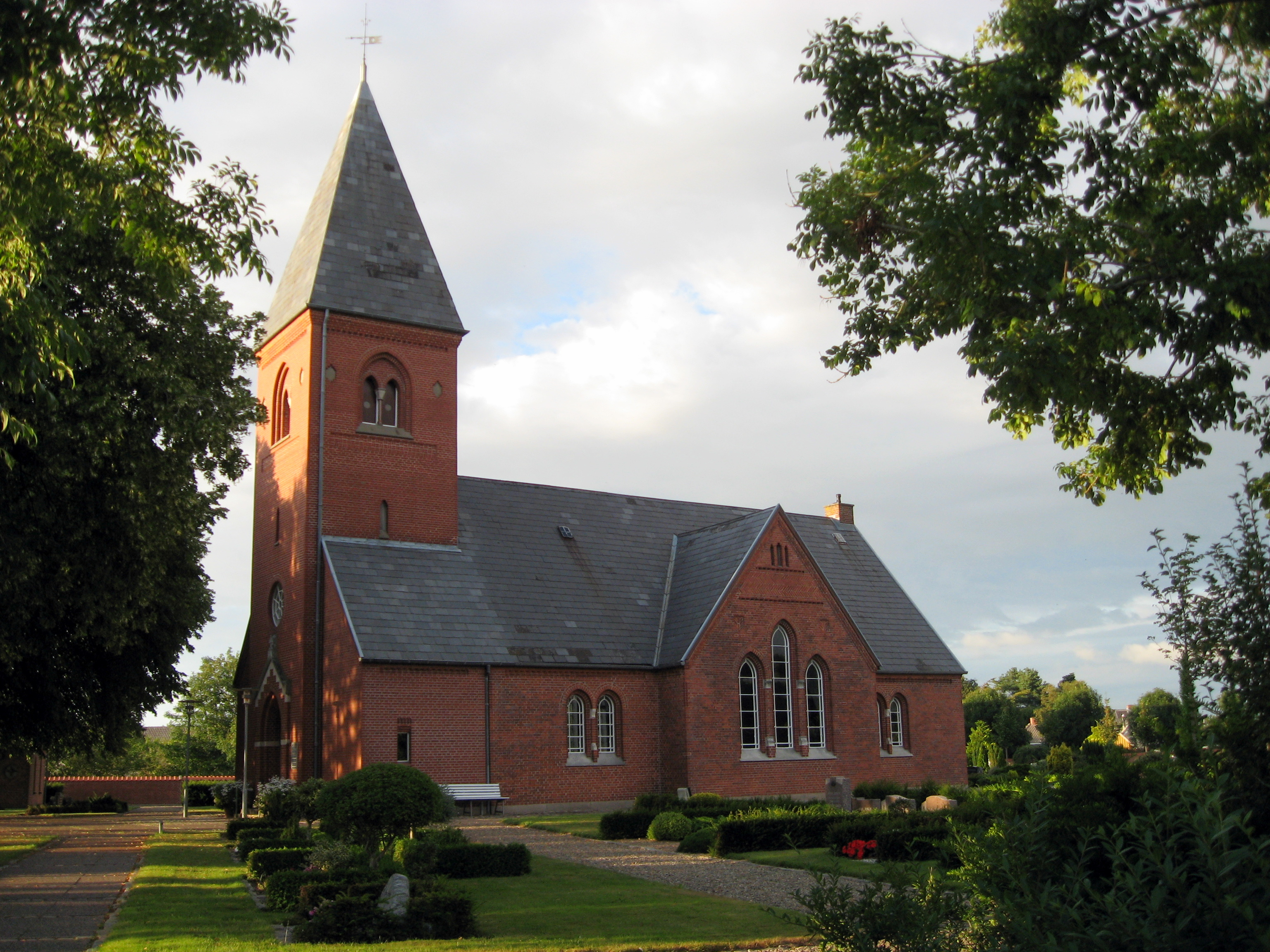 Vedsted Kirke, Jammerbugt Kommune